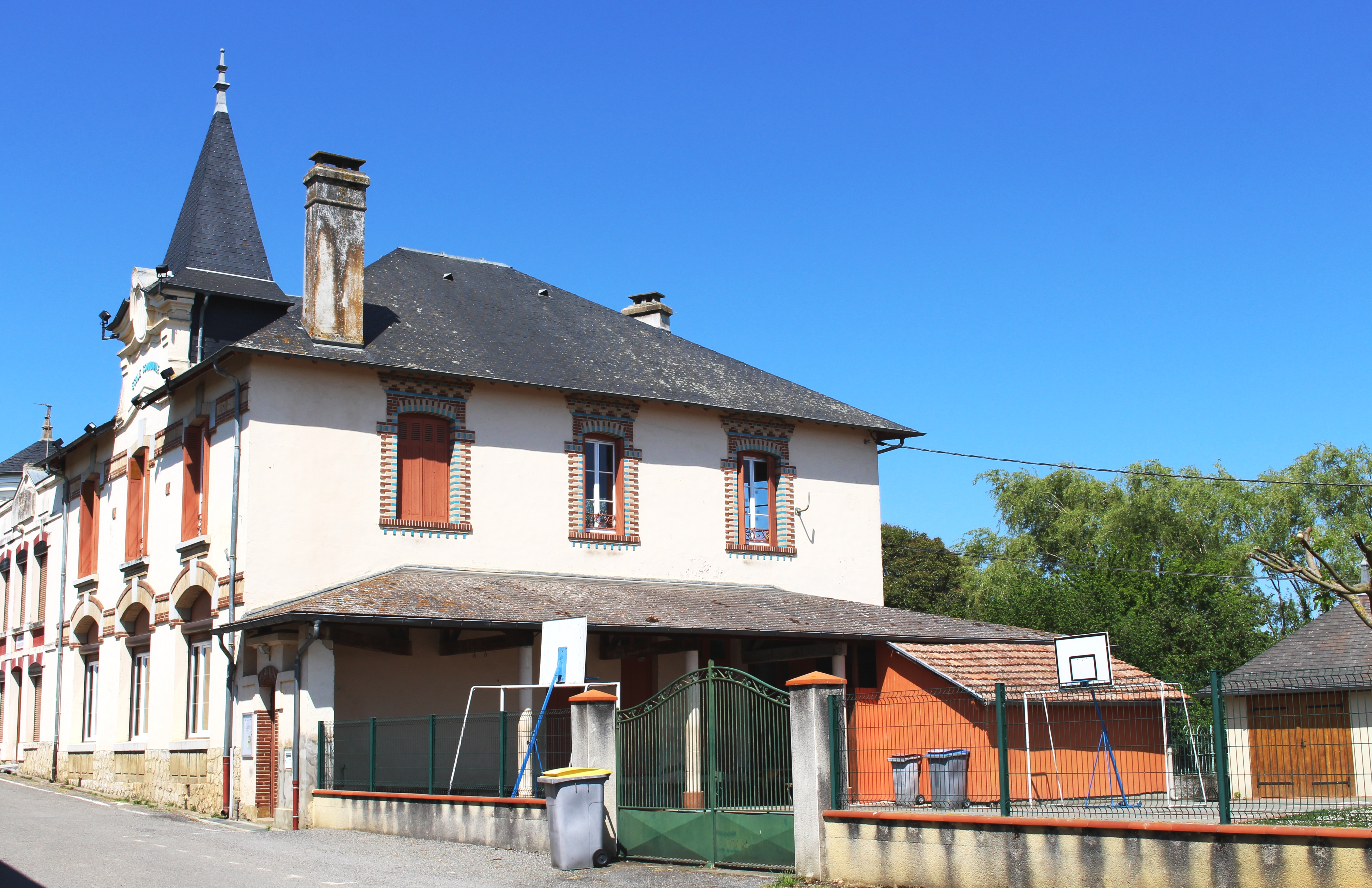 École de Souyeaux (Hautes-Pyrénées)